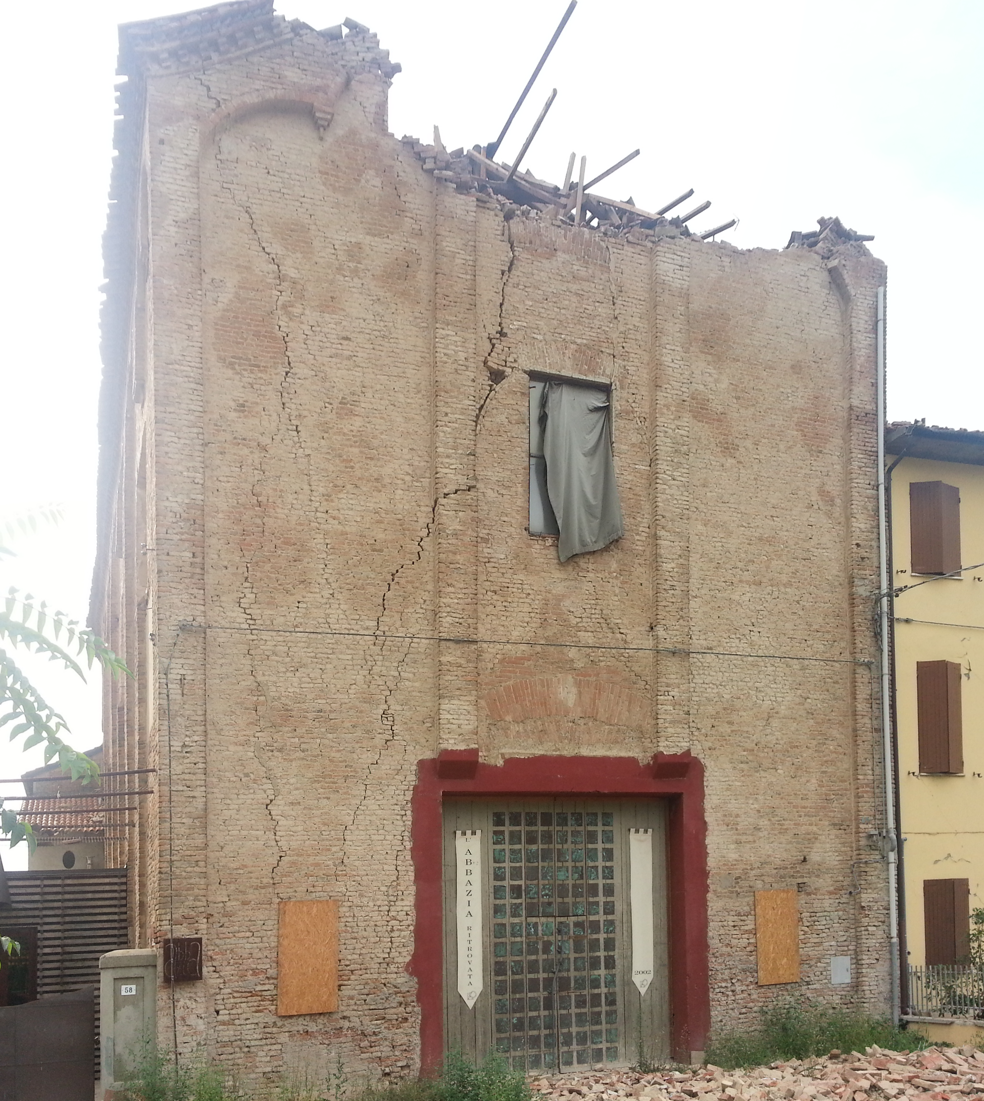 Resti della vecchia Abbazia di San Michele a Poggio Renatico dopo il terremoto del 2012